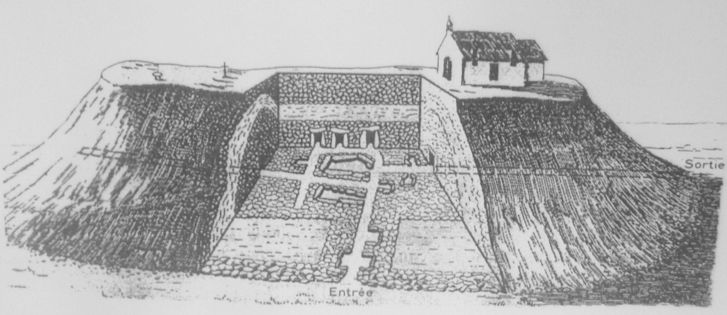 Carnac : plan du tumulus Saint-Michel par l'archéologue Zacharie Le Rouzic (1864-1939)